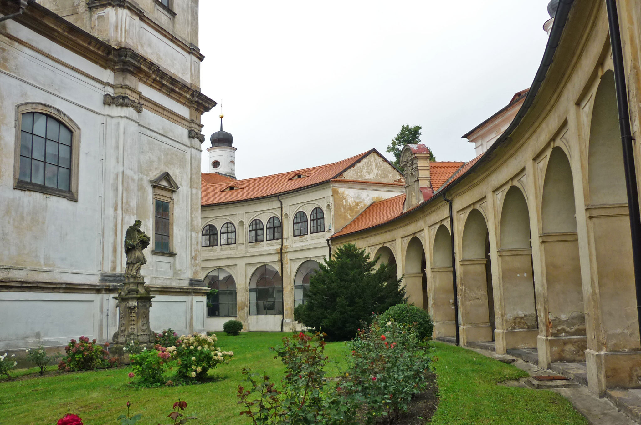 Prozessionsumgang an der Wallfahrtskirche Schmerzen Mariens in Mariaschein (Bohosudov) in Nordböhmen